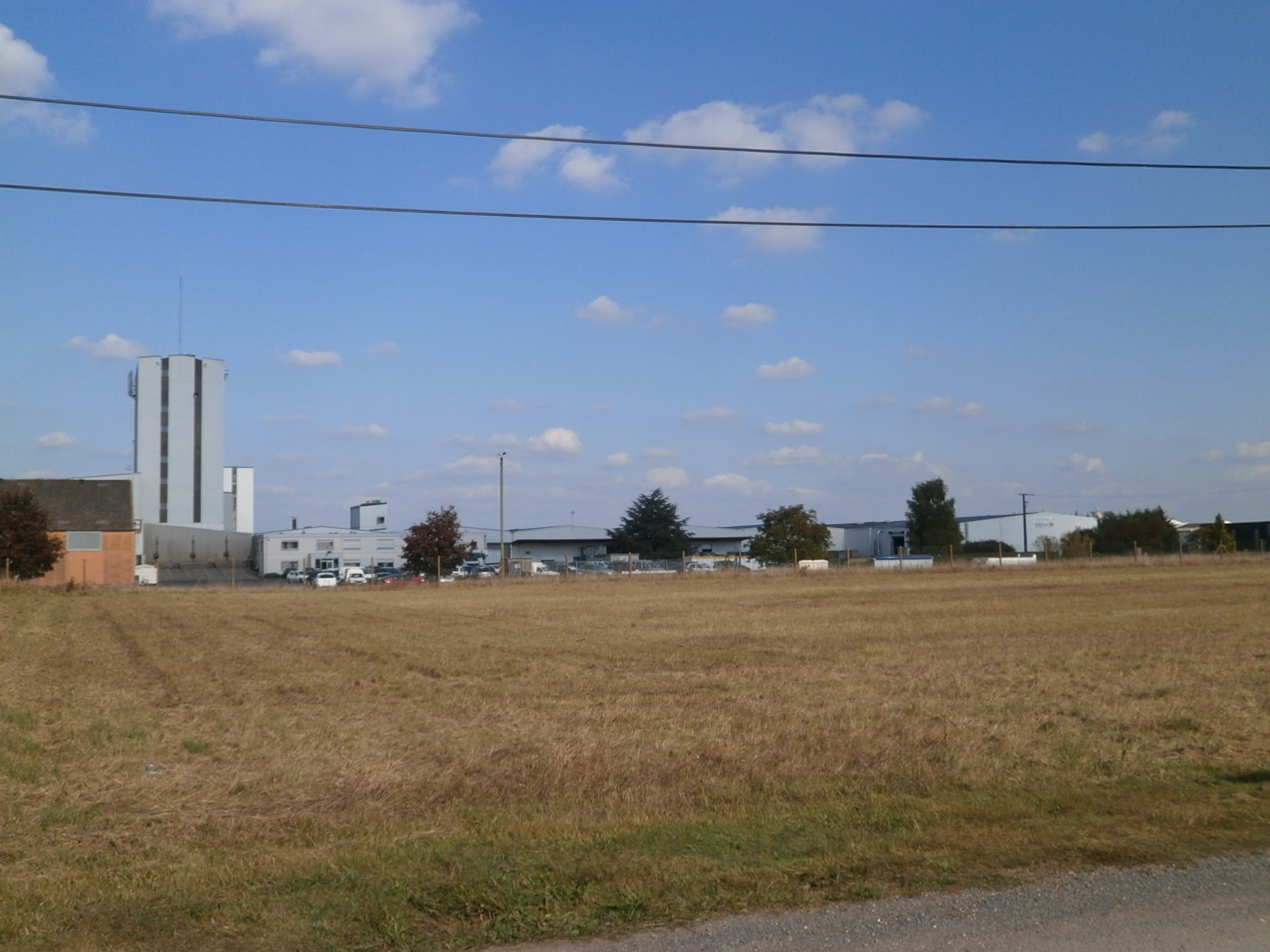 Vue partielle de la Zi de la gare de Reignac